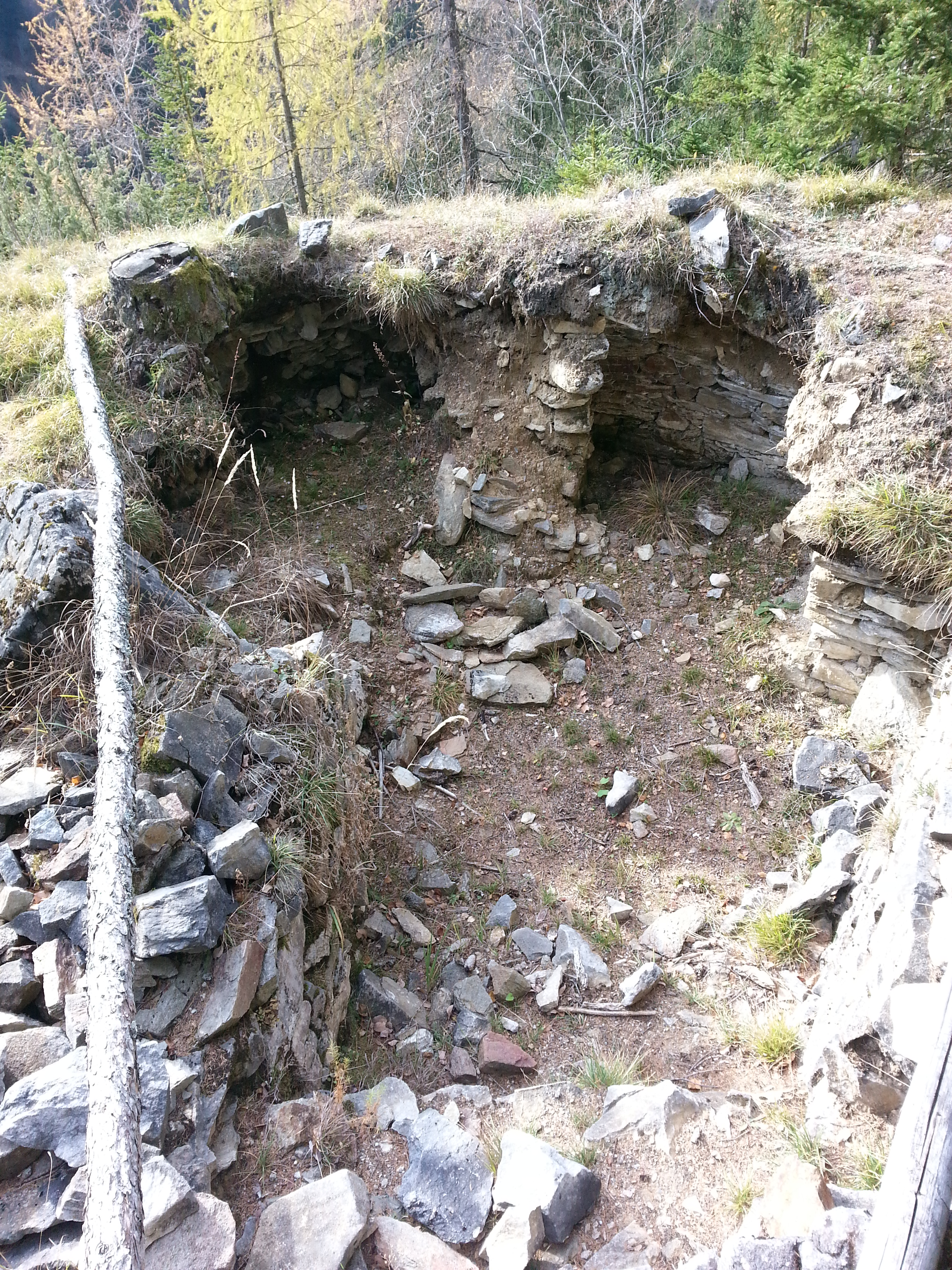 Die Reste eines Wehrturmes auf einem Hügel vor der Burg Klingenstein